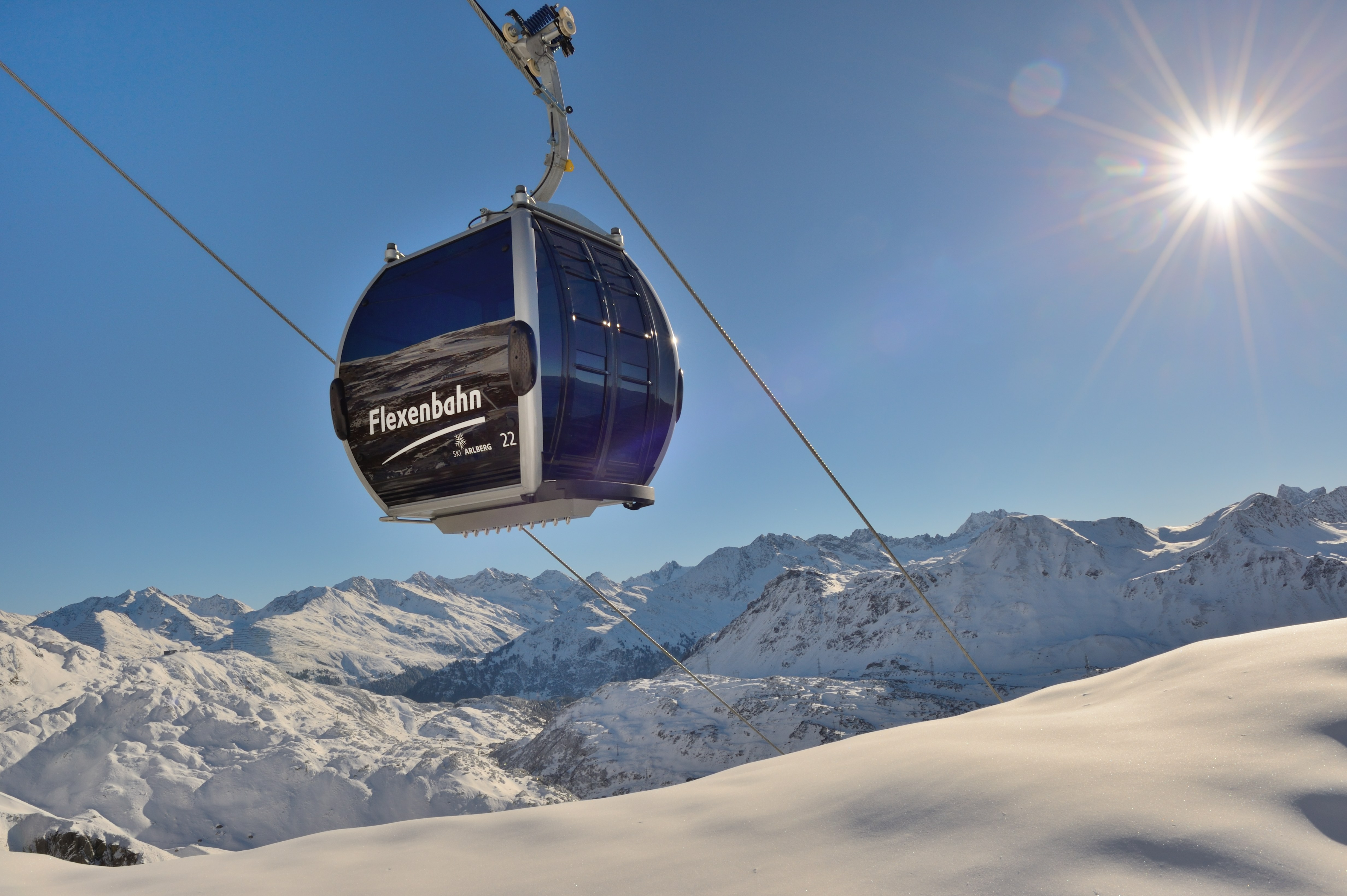 Die neue Verbindungsbahn zwischen St.Anton/St.Christoph und Lech/Zürs